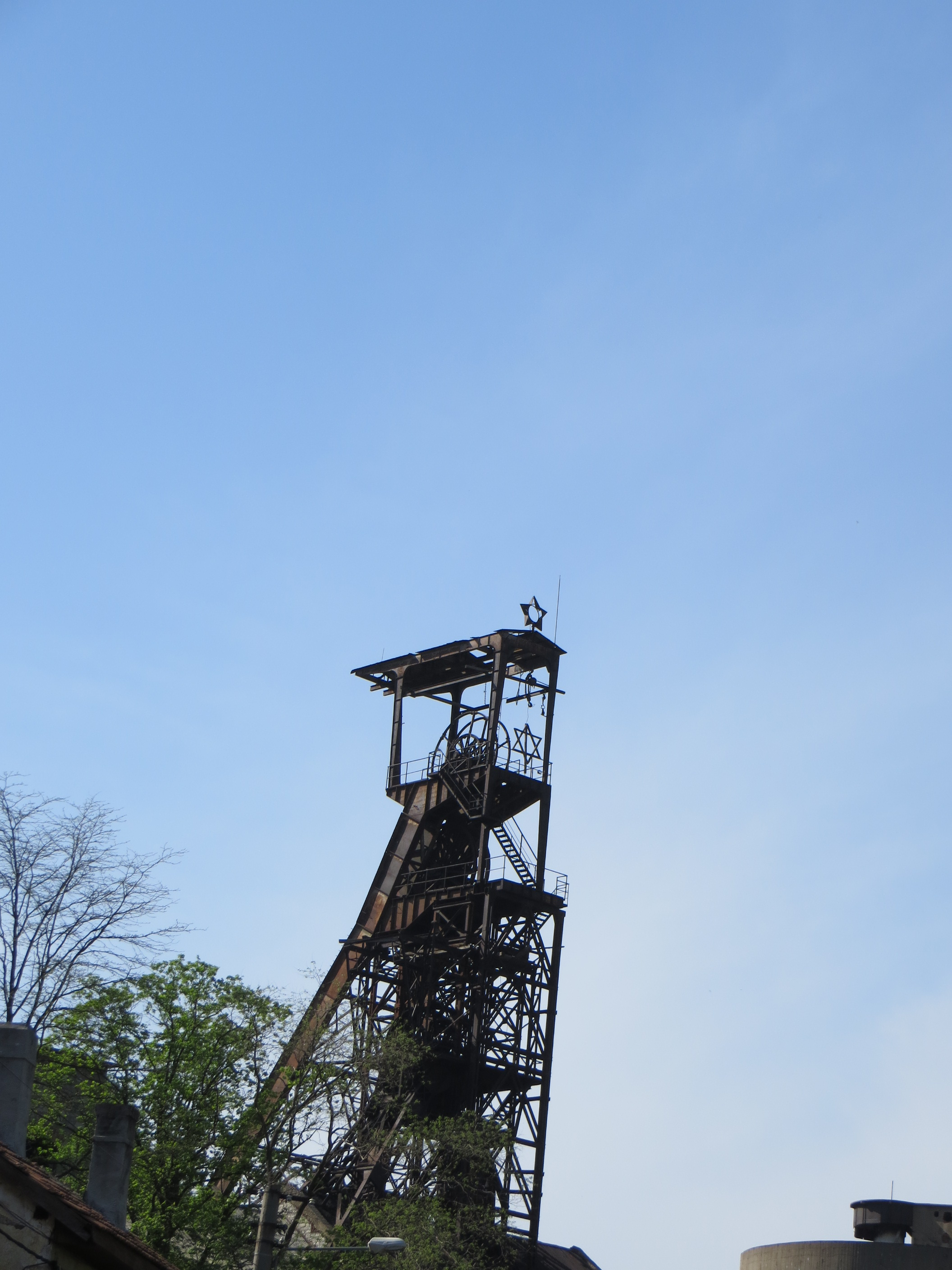 Puțul I (Casa Turnului de extracție cu aburi, Turnul cu molete, lămpărie, construcții și instalații de extracție și manevrare minereu, ateliere și servicii tehnice de exploatare și servicii sociale) 01